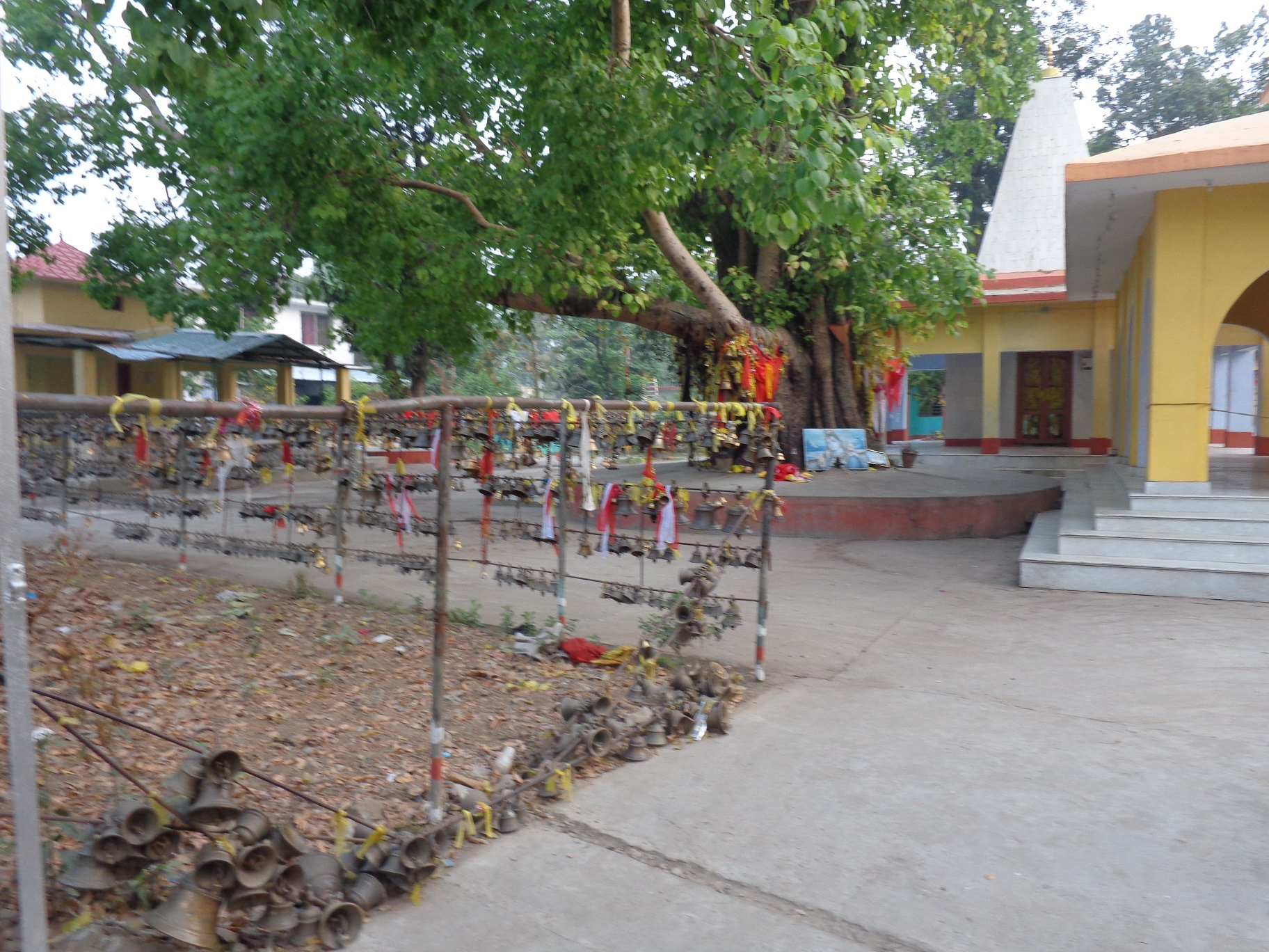 नेपाल भाषा: Nepal mahendranagr